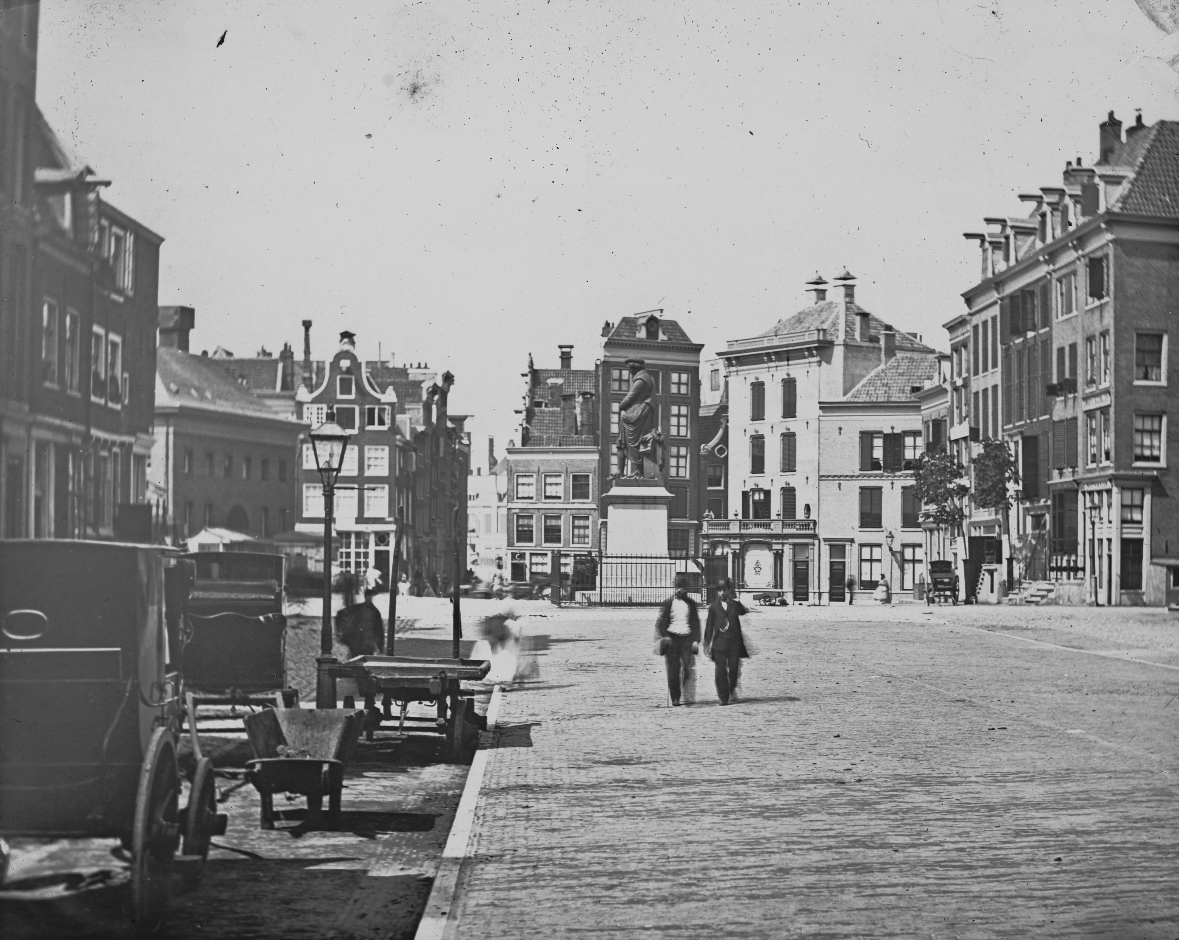 Beschrijving Het Rembrandtplein gezien vanaf Thorbeckeplein naar de ingang van de Reguliersbreestraat en de ingang van de Halvemaansteeg Links van het standbeeld Rembrandtplein 2 / Reguliersbreestraat 48, de huizen Rembrandtplein 4-14 en een gedeelte van Thorbeckeplein 2 (v.r.n.l.). Stereoglasdia in houten frame. Documenttype foto Vervaardiger Oosterhuis, Pieter Collectie Collectie Stadsarchief Amsterdam: foto-afdrukken Datering 1865 t/m 1870 Geografische naam Thorbeckeplein Rembrandtplein Reguliersbreestraat Inventarissen Afbeeldingsbestand ANWI00110000001 Generated with Dememorixer